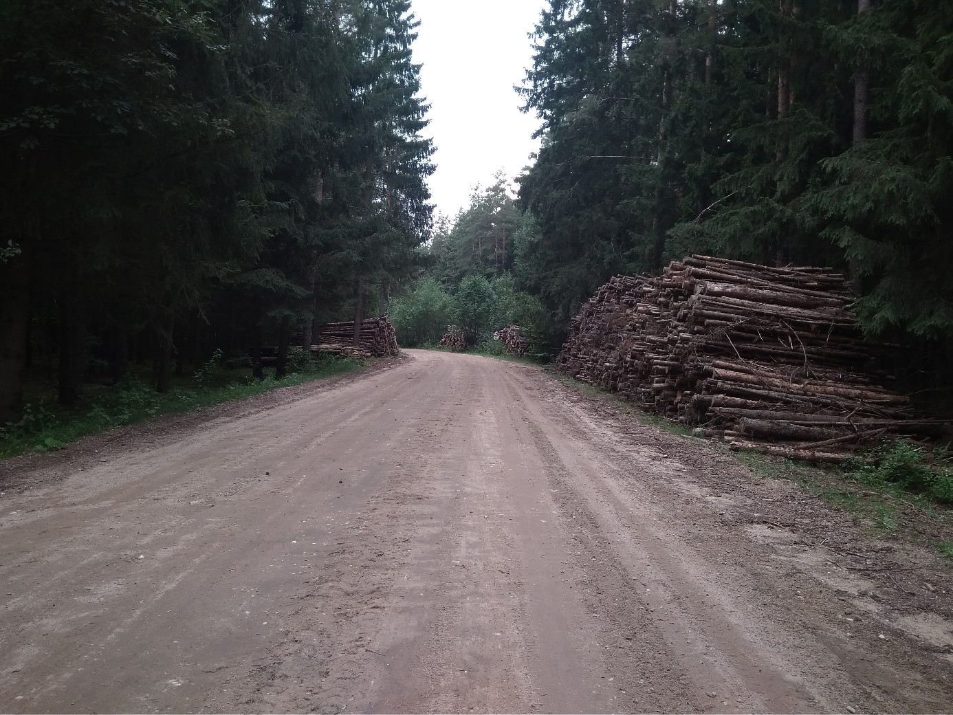 лесная автодорога Даниловичи - Александрово